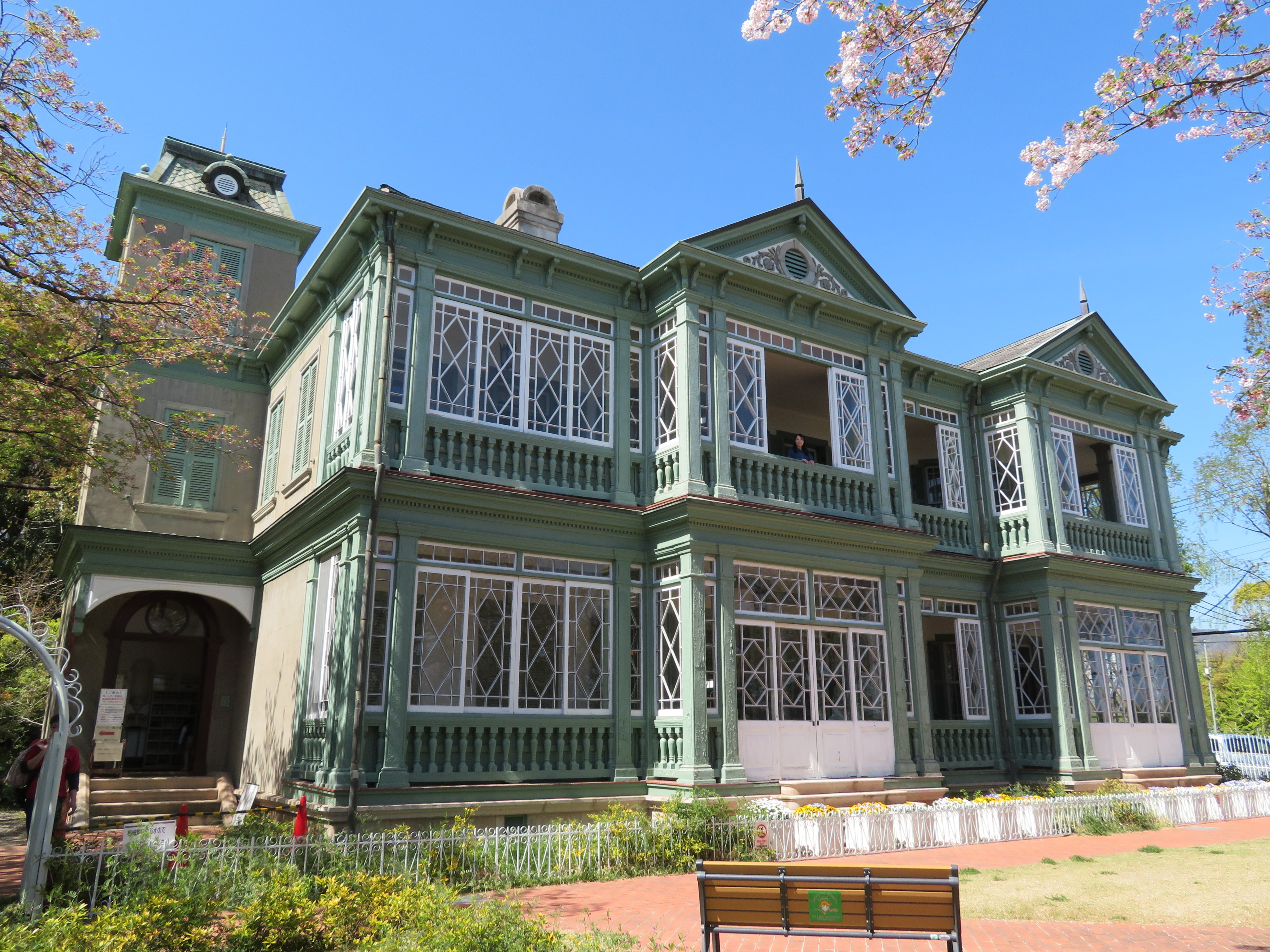 旧ハンター住宅 Canon PowerShot SX730 HS